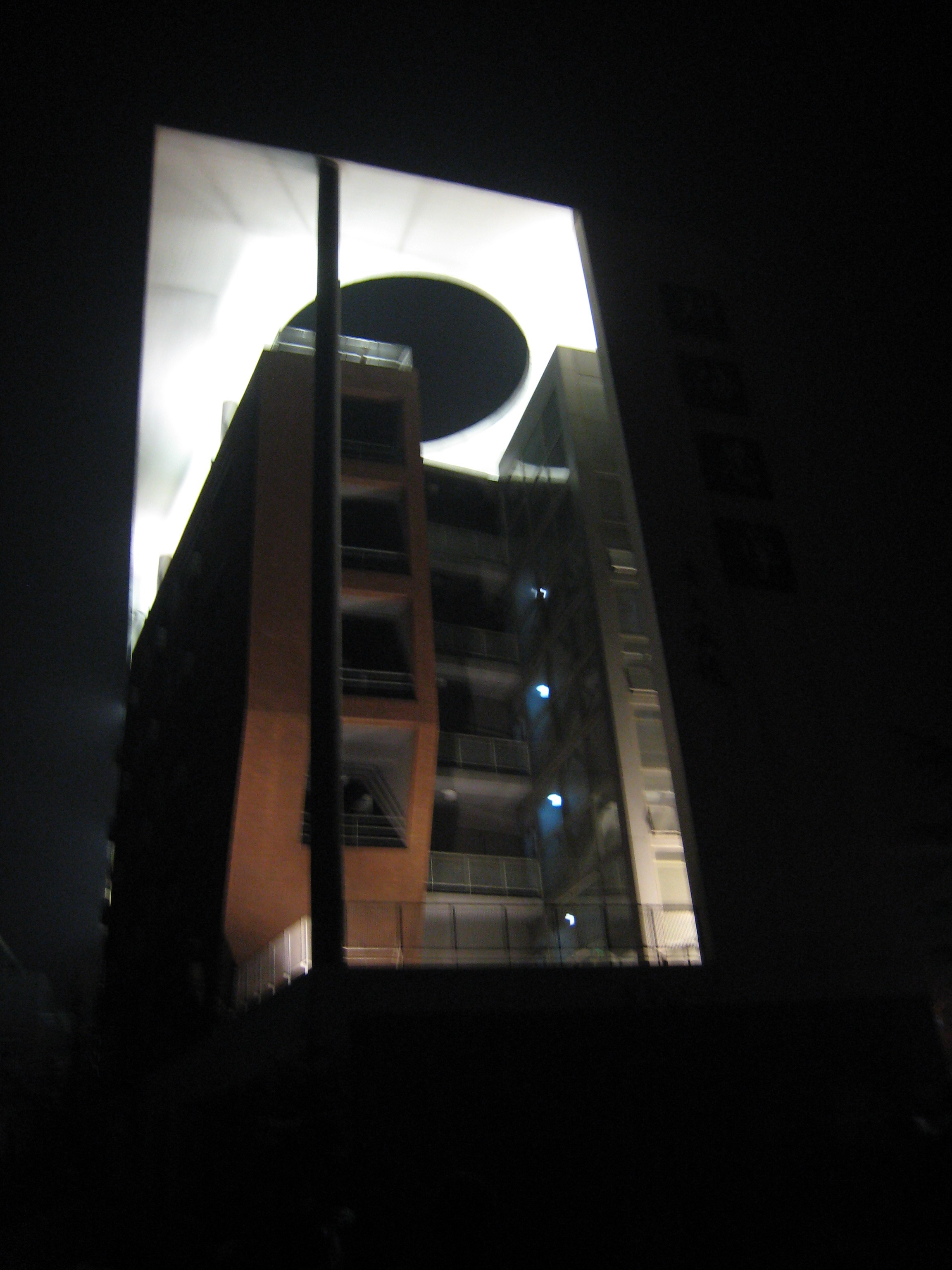 夜间的思学楼